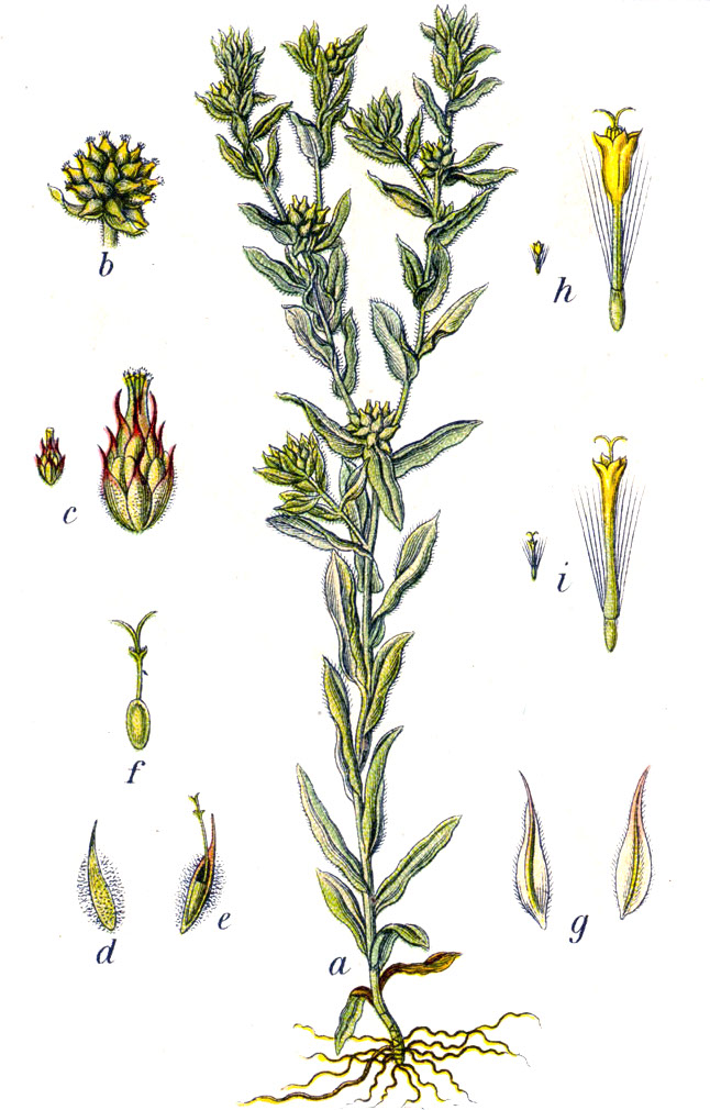 Filago vulgaris Lam., syn. Filago germanica L. non Huds. 1762, nom. illeg. Original Caption Deutsches Ruhrkraut, Filago germanica